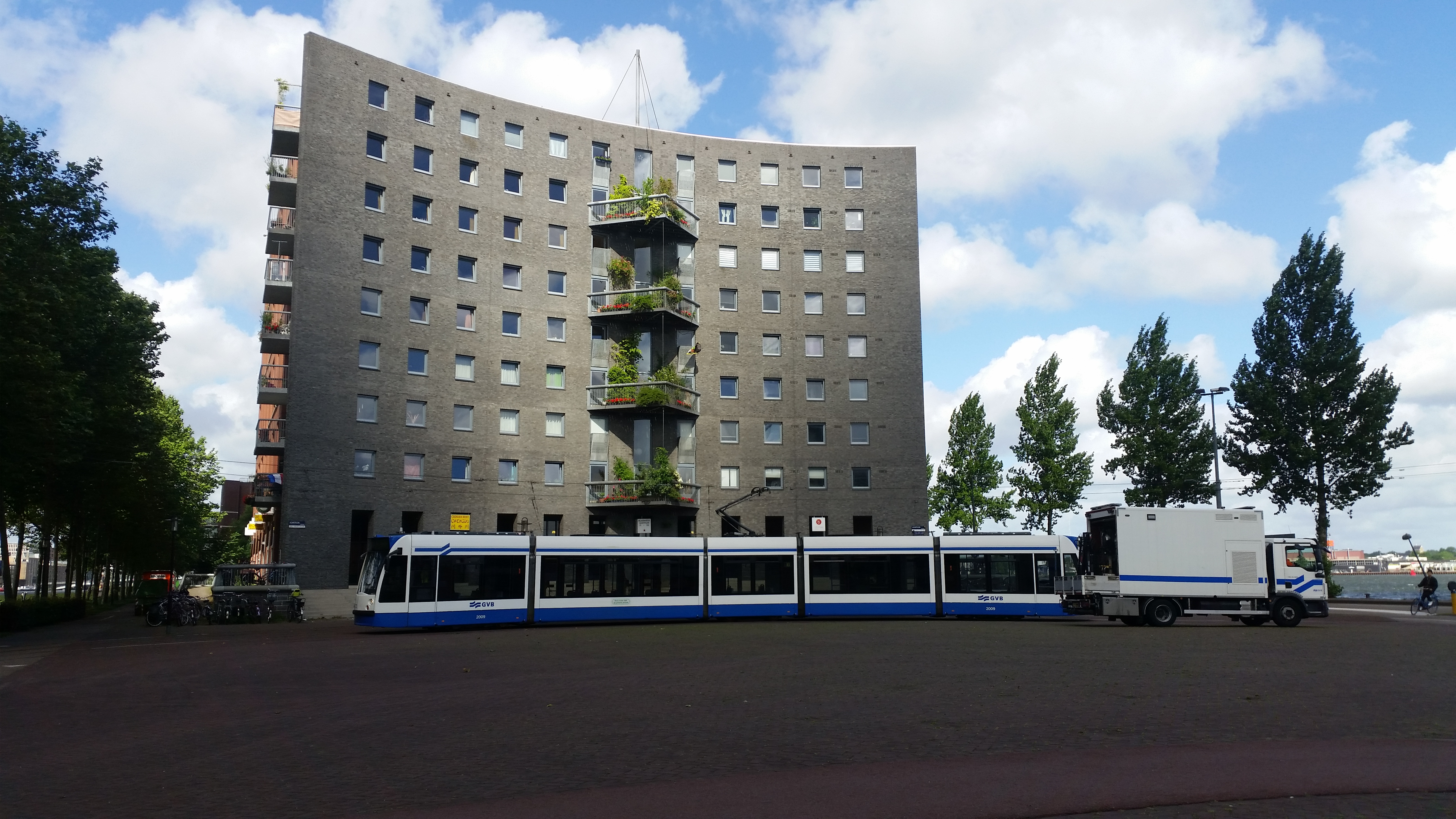 Keerlus lijn 10 op het Azartplein, er mocht hier niet in- of uitgestapt worden